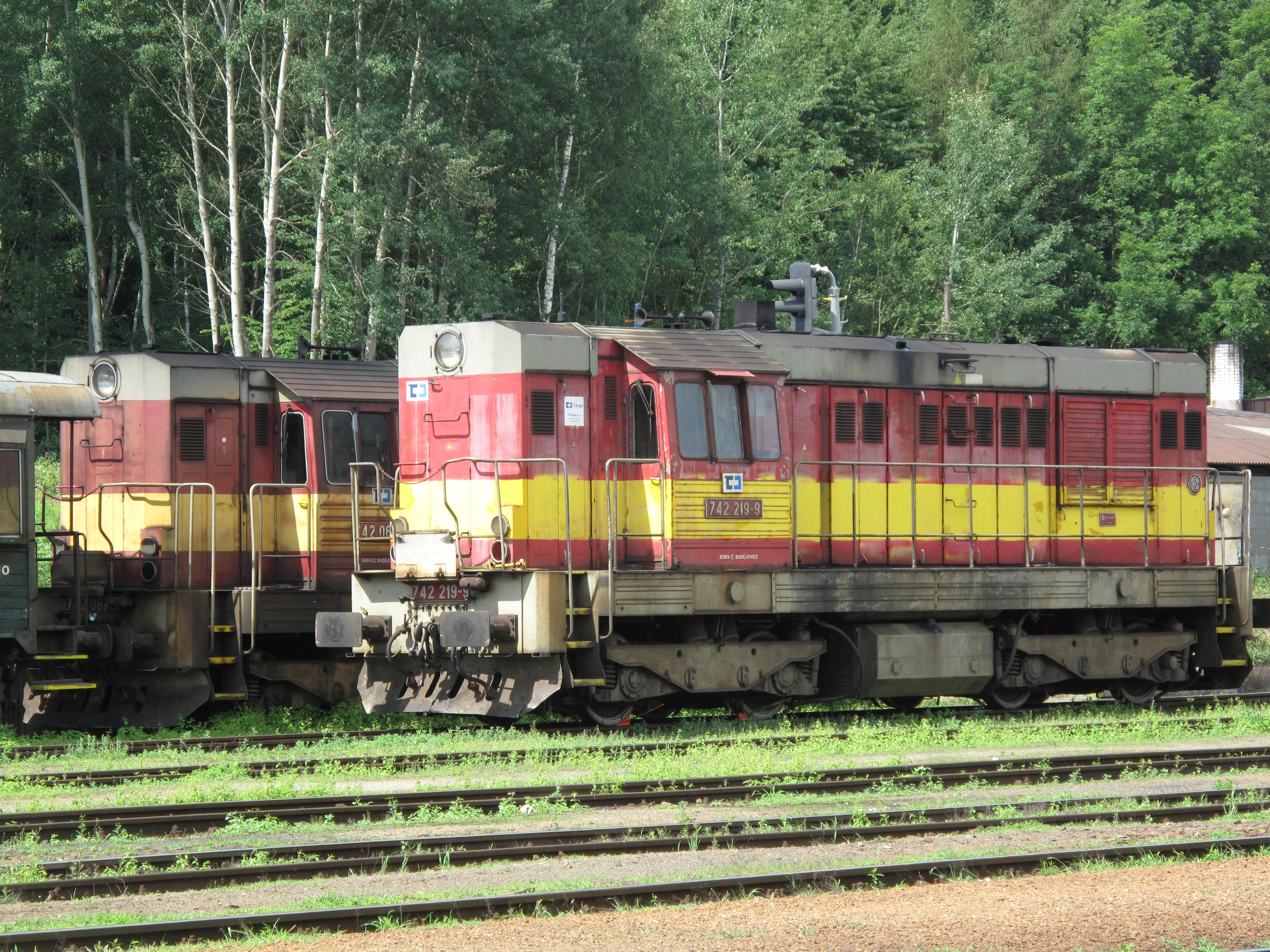 Domažlice, lokomotiva 742